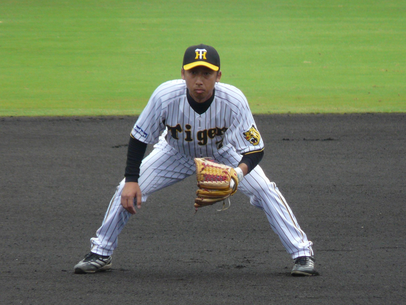 Copied from 画像:HT-Makoto-Imaoka-2.jpg: "今岡誠"